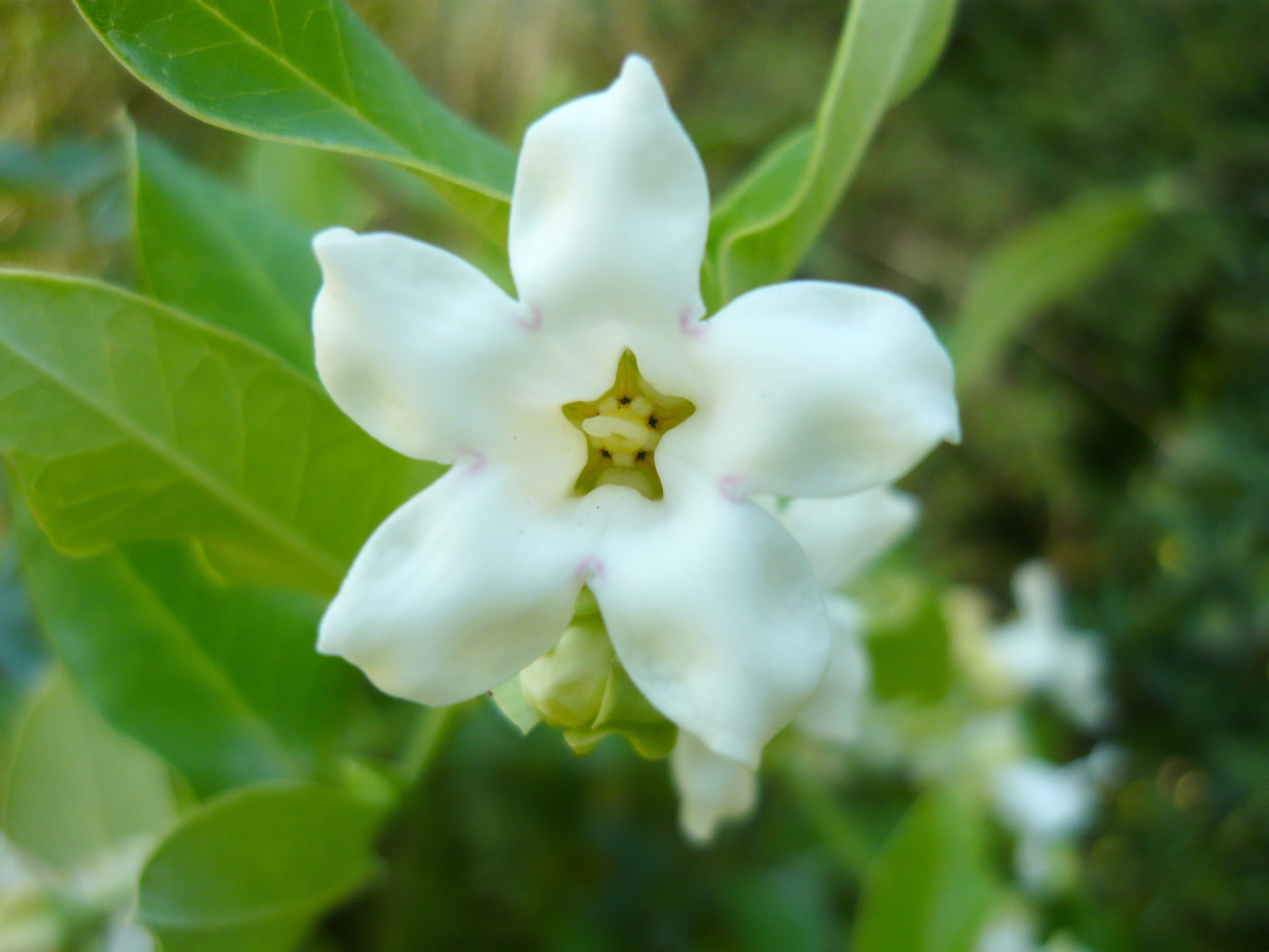 Araujia sericifera. Real Jardín Botánico de Madrid